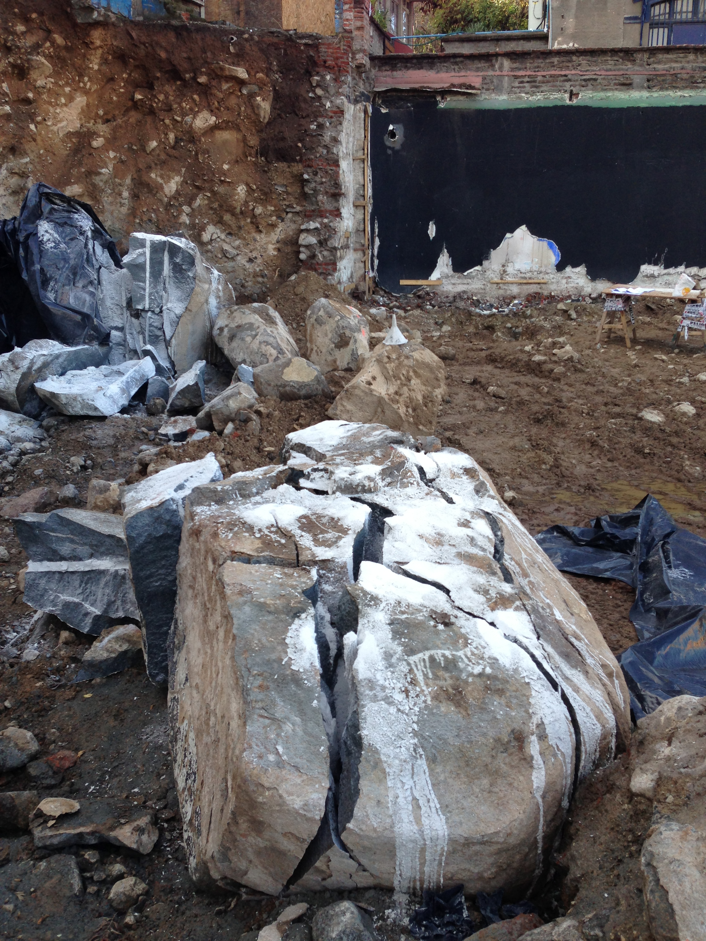 Rotura de roca con cemento expansivo en la ciudad de Santiago de Chile, cortesía de